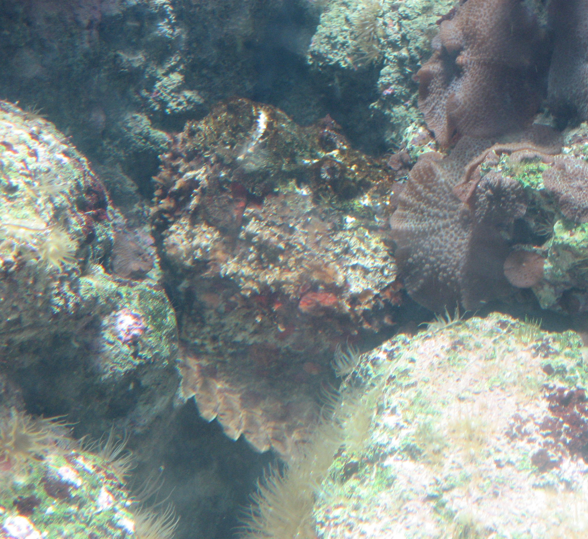 Synanceia verrucosa in Aquarium Cinéaqua Map: 48° 51' 44" N 2° 17' 27" E